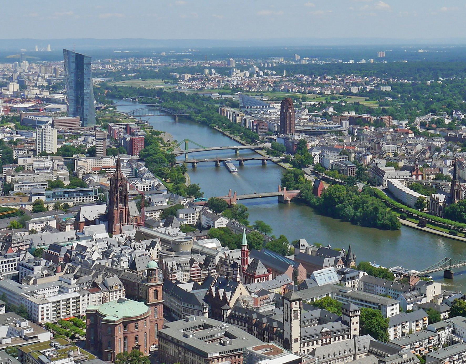 Die Neue Altstadt und die Mainbrücken, vom Eisernen Steg bis zur Osthafenbrücke, 2018 in Frankfurt am Main.